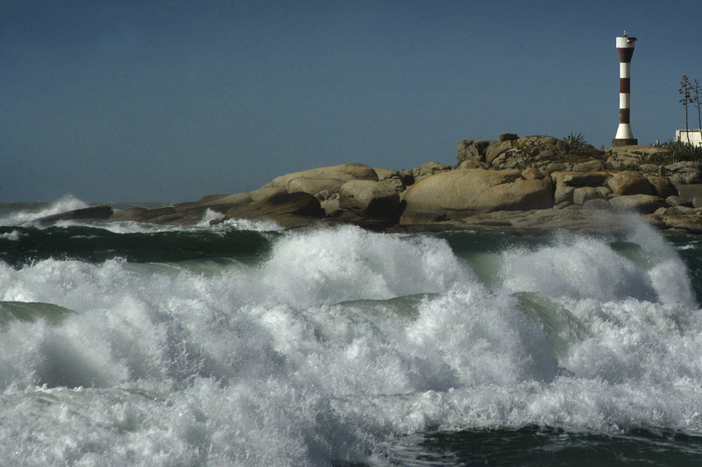 Faro punta Palmar, departamento de Rocha, Uruguay